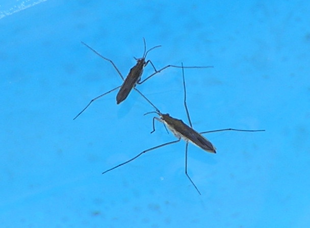 Водомерка в бухте Ласпи